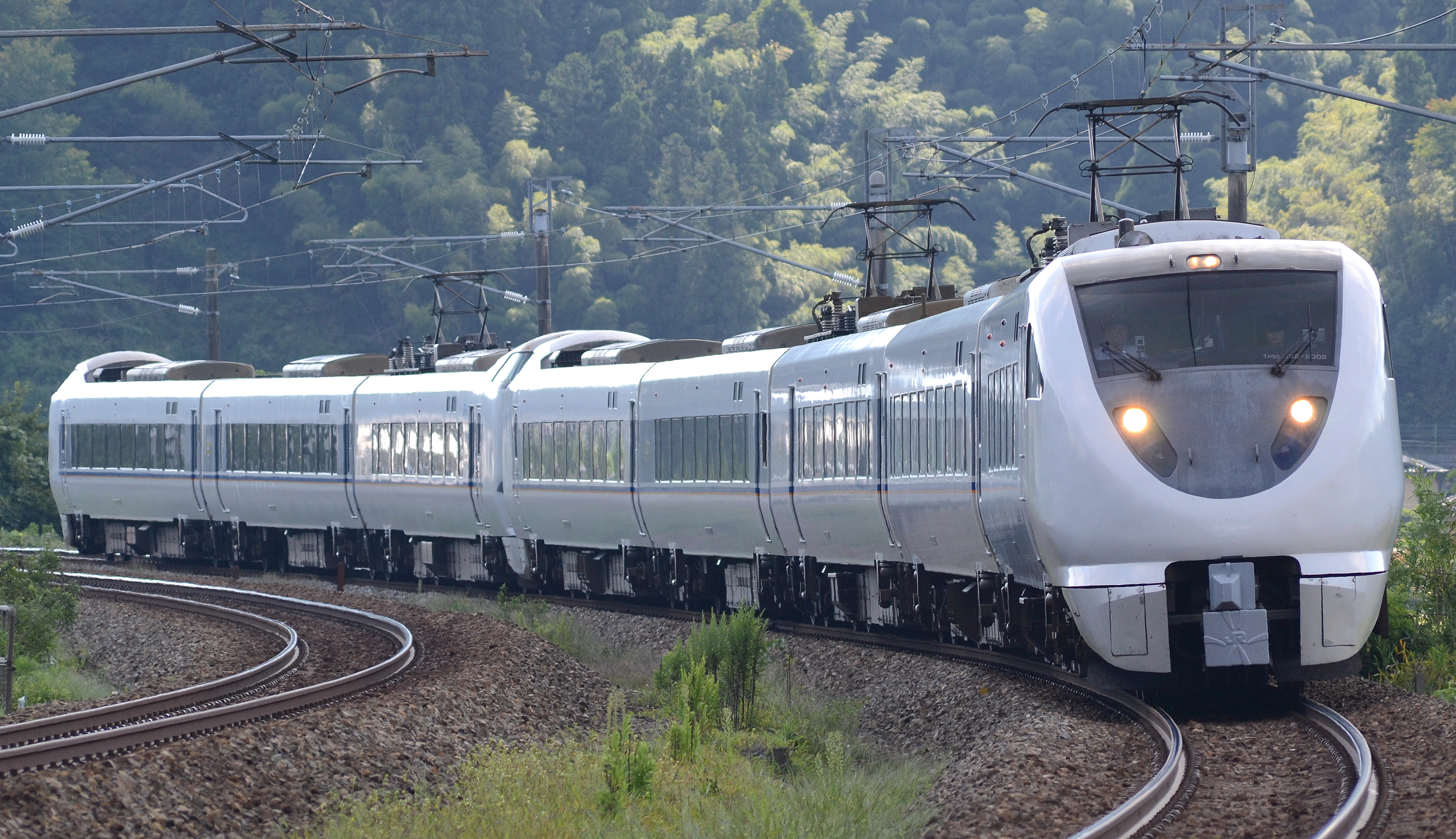 北陸本線、倶利伽羅峠駅付近を走行する、金沢総合車両所所属の683系2000番台による特急｢しらさぎ」（公道から撮影）